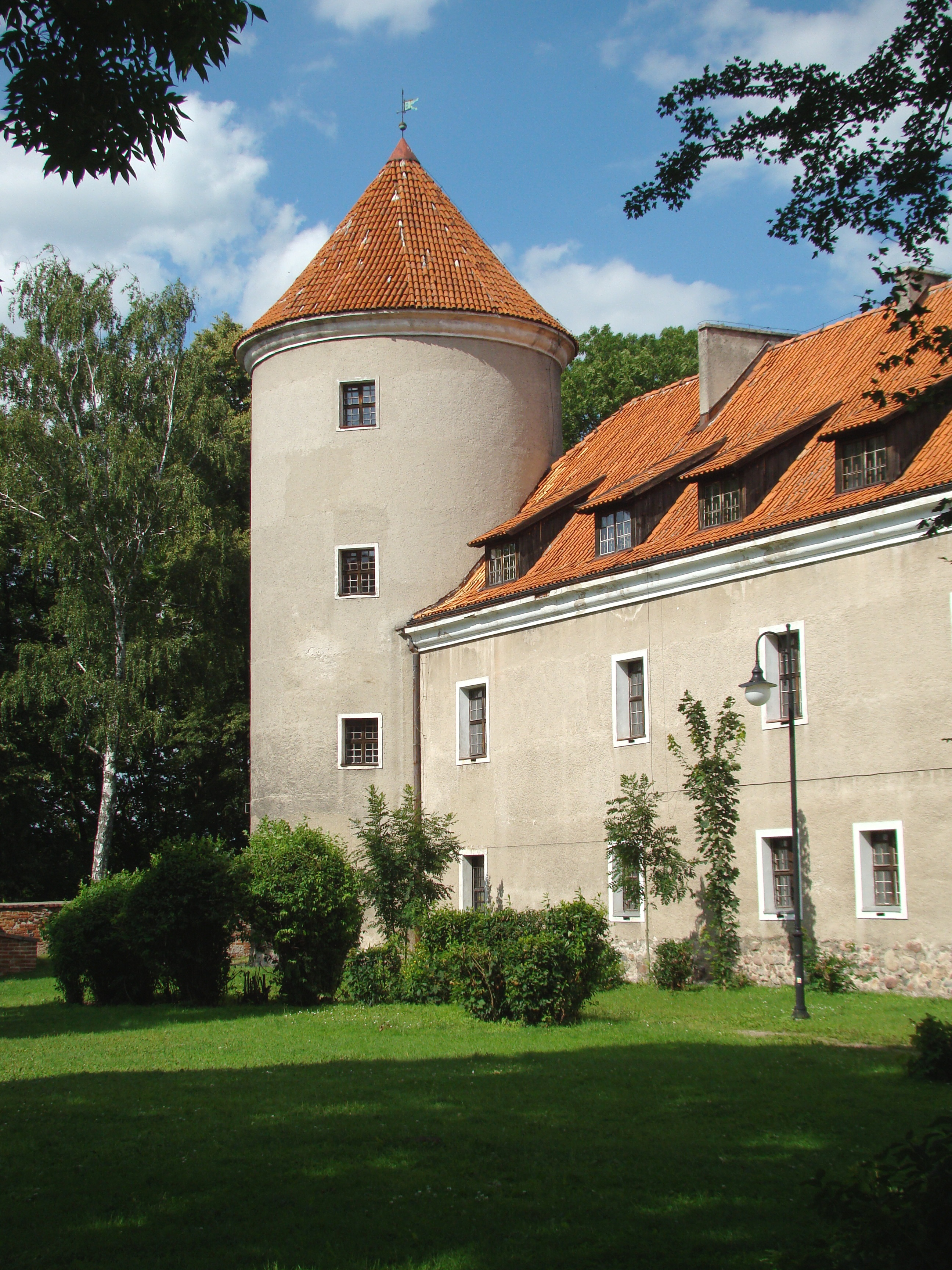 Pasłęk, fragment zamku